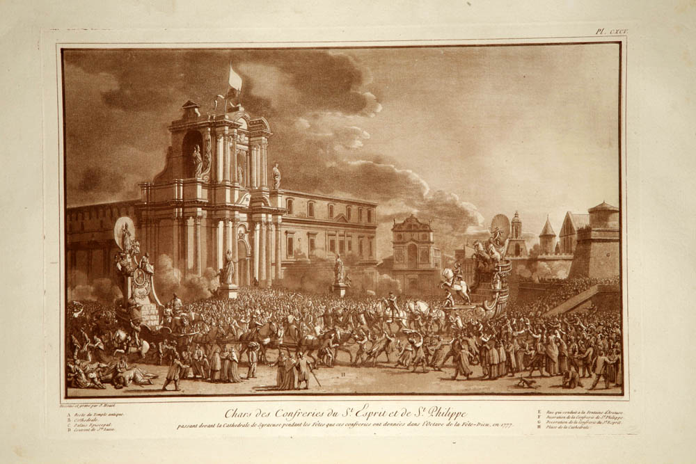 Festa del Corpus Domini in piazza Duomo